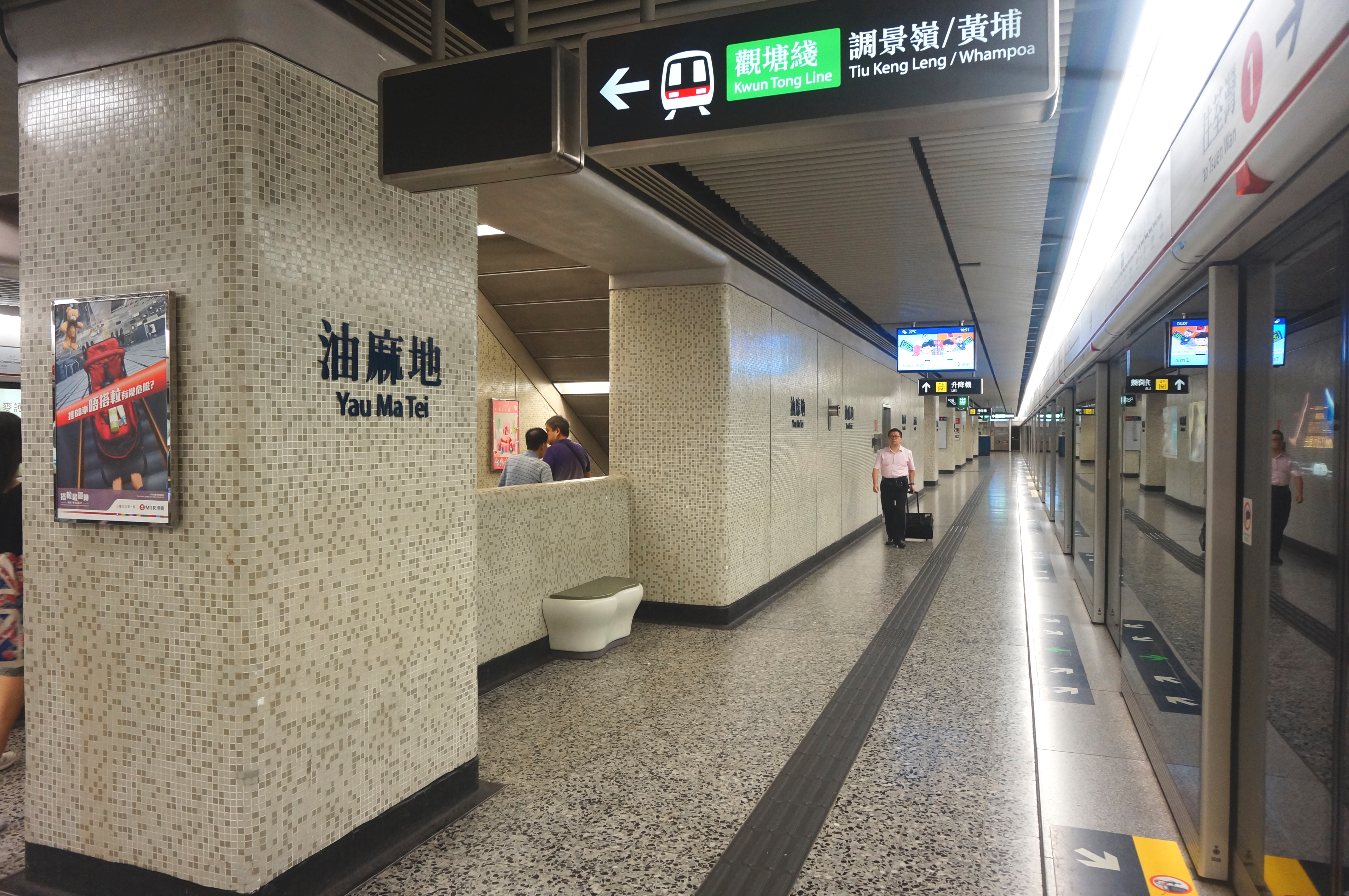 港鐵油麻地站月台